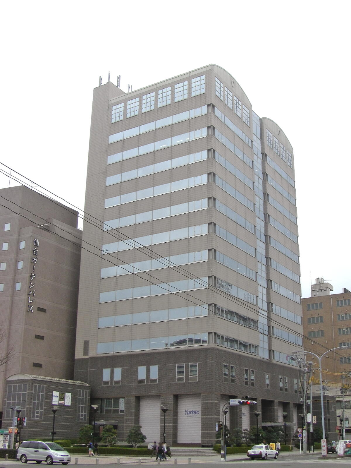 ユアテック本社